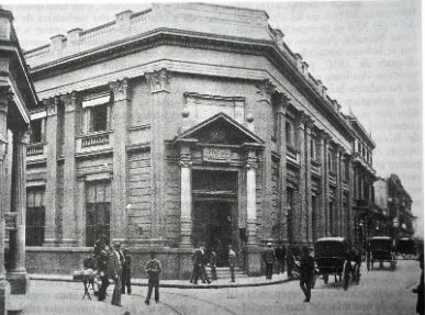 Fachada del Banco de Londres y Río de la Plata, ubicado en la esquina de Piedad (Mitre) y Reconquista, Ciudad de Buenos Aires.